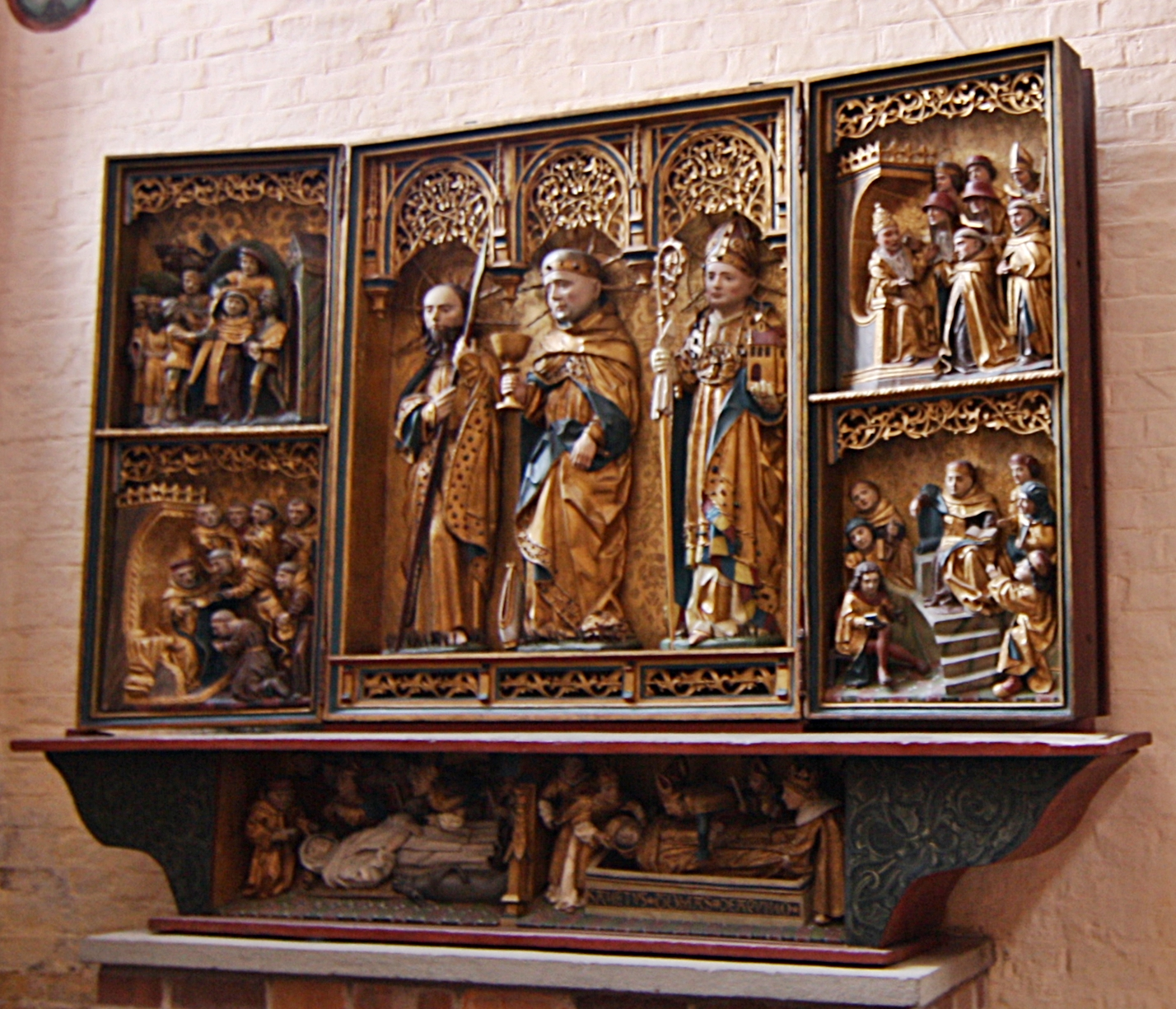 Thomasaltar